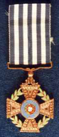 Medalha valor militar grau bronze